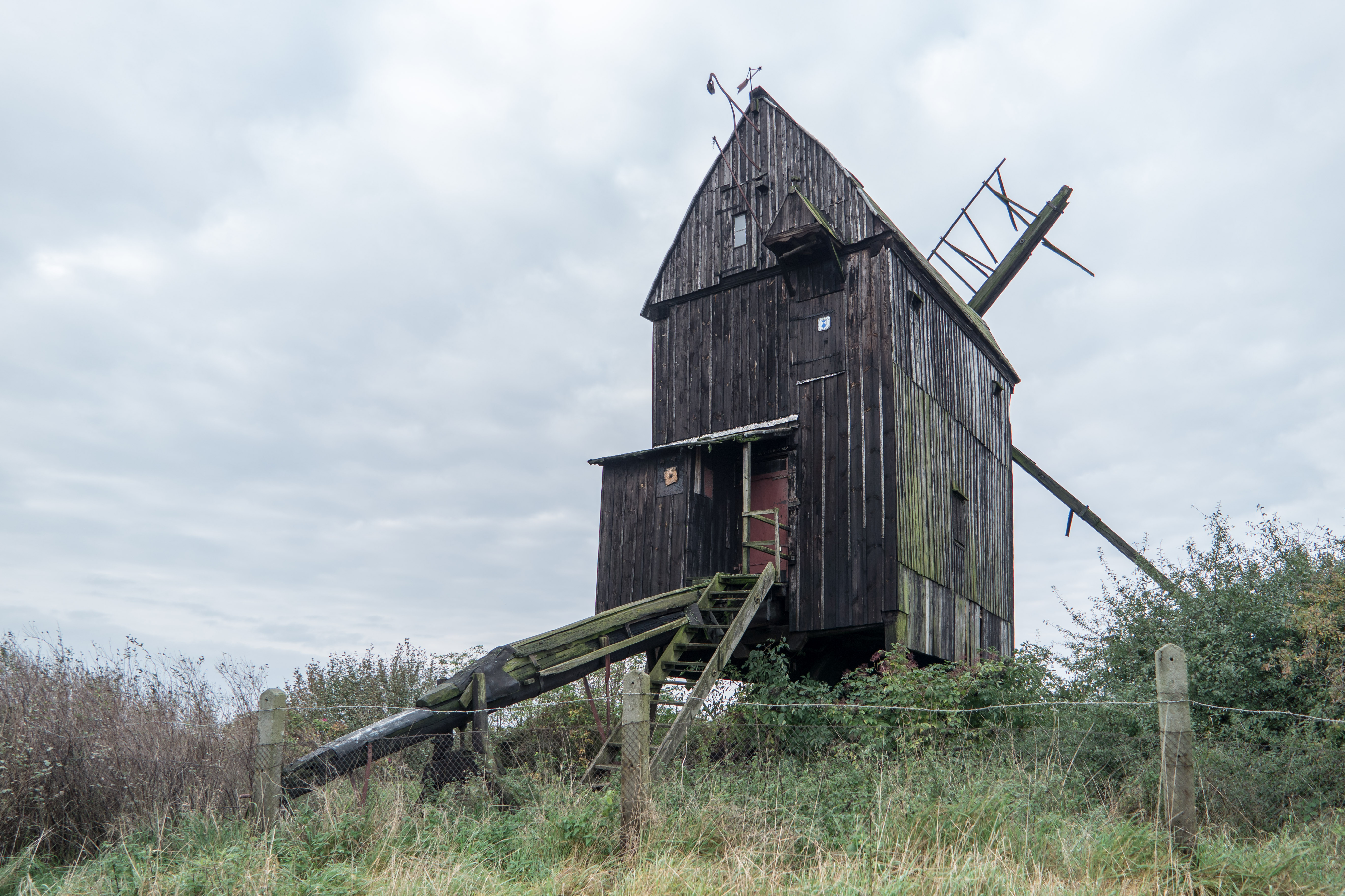 Bockwindmühle Schernikau (Ruine), Keindorfstraße in Ingersleben OT Ostingersleben